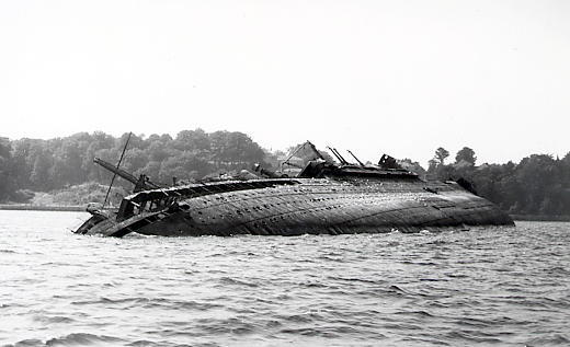 Die in Kiel nach US-Bombenangriff gekenterte New York der Hapag